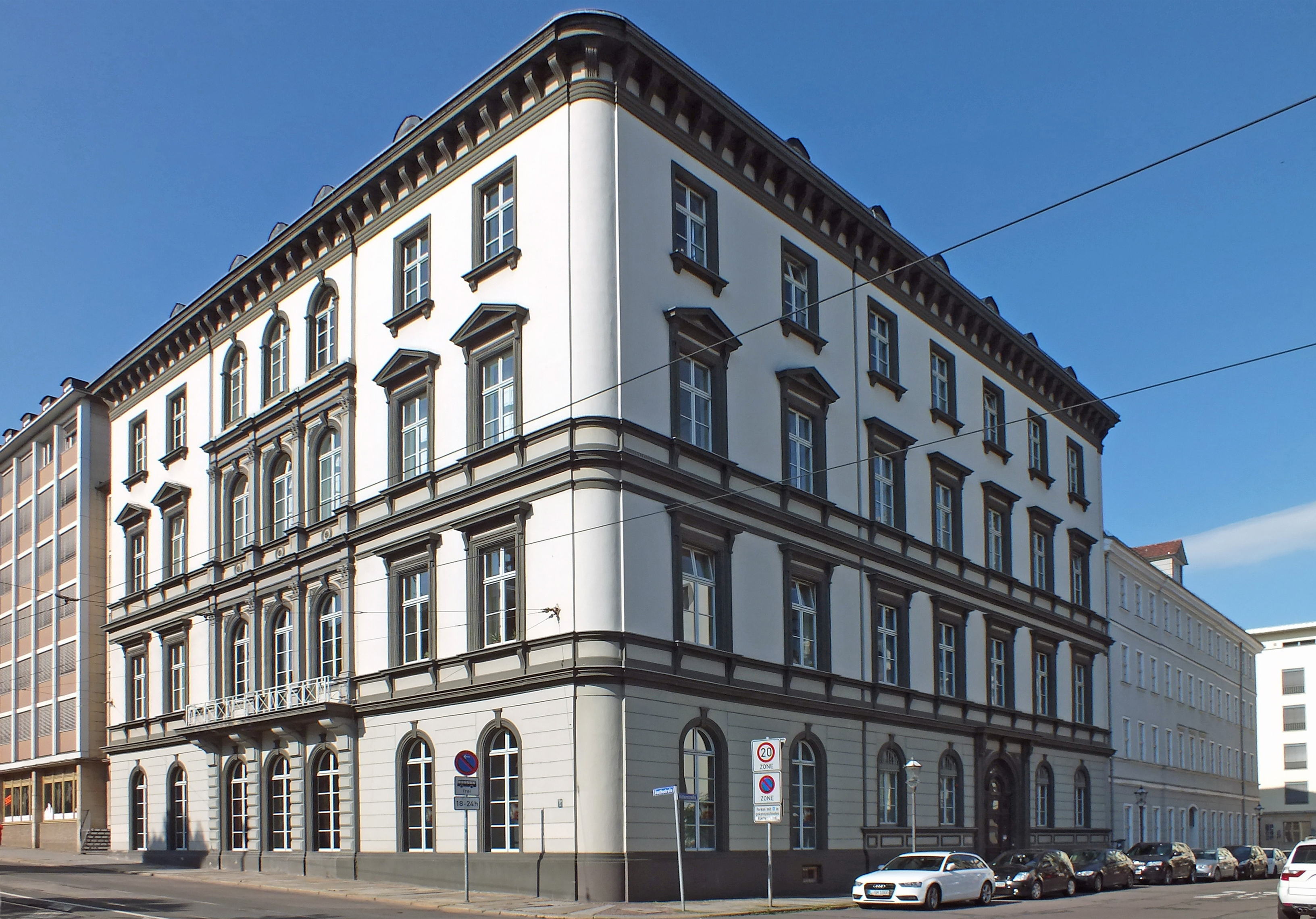 Das ehemalige Königliche Palais in Leipzig, jetzt Rektorat der Universität